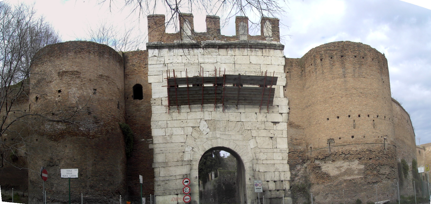 Roma , Porta Latina (dall'esterno)